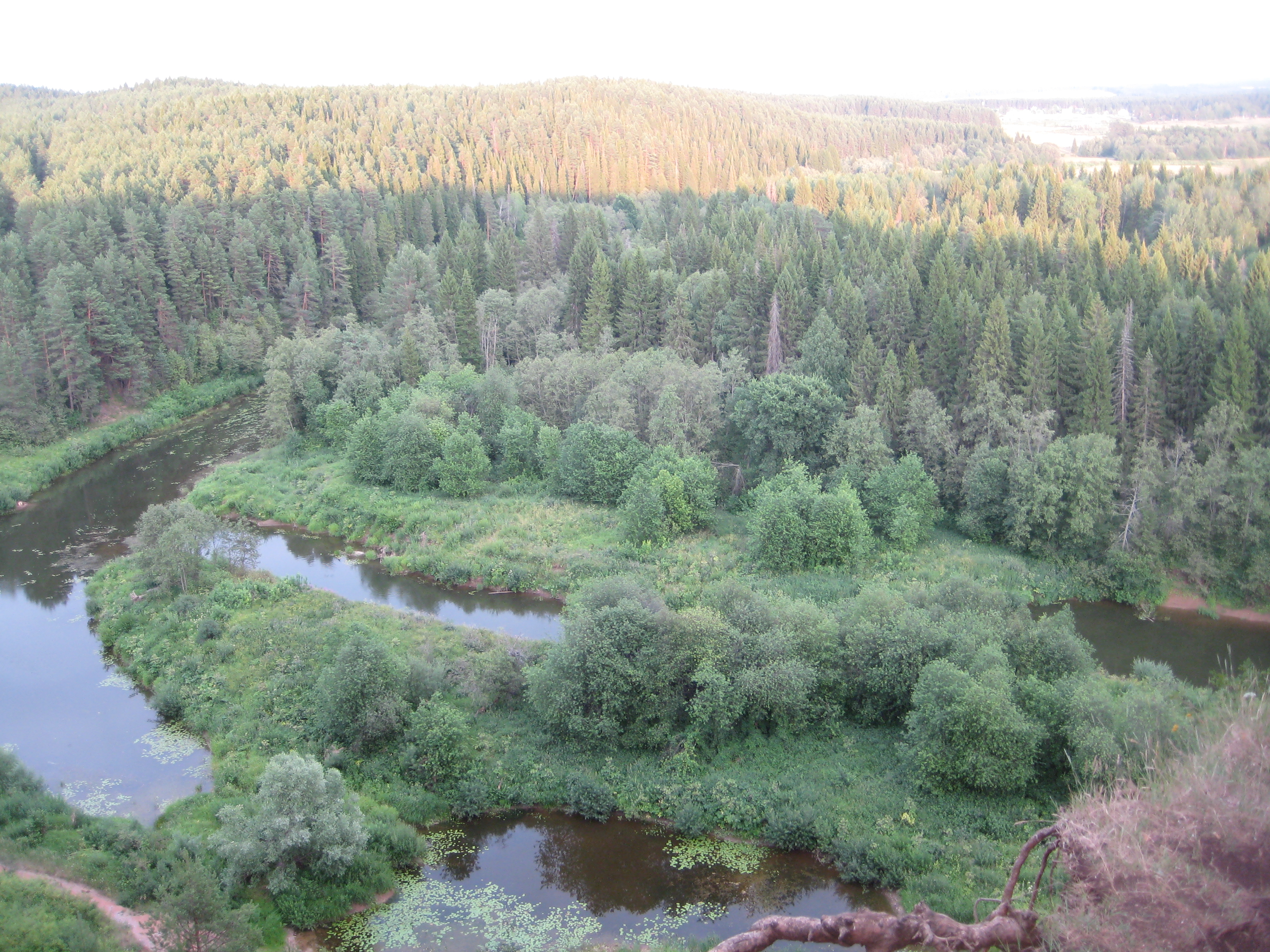 Урочище Байгурезо, Дебёсский район This image is related to the protected area of Russia number 1810045